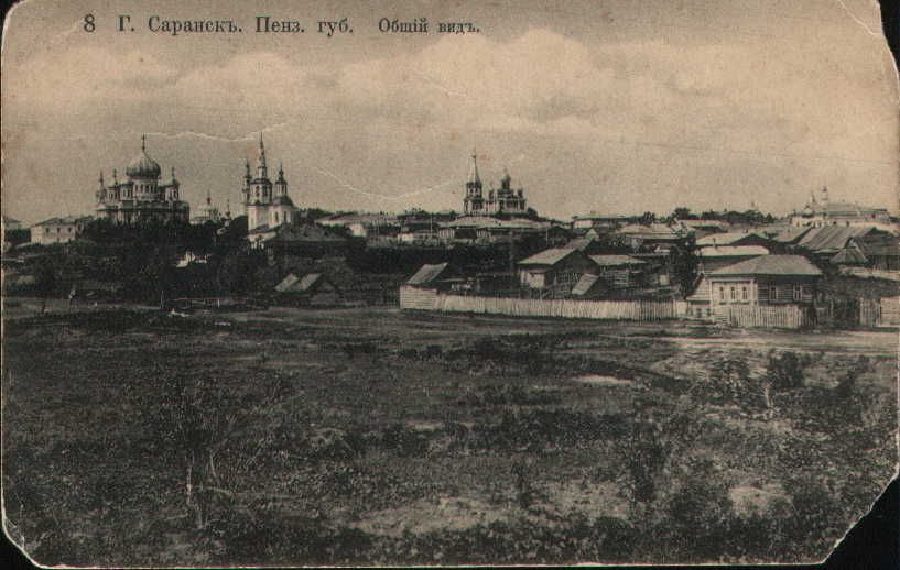 г. Саранск Общий вид Спасский собор церкви и жилой сектор 1917